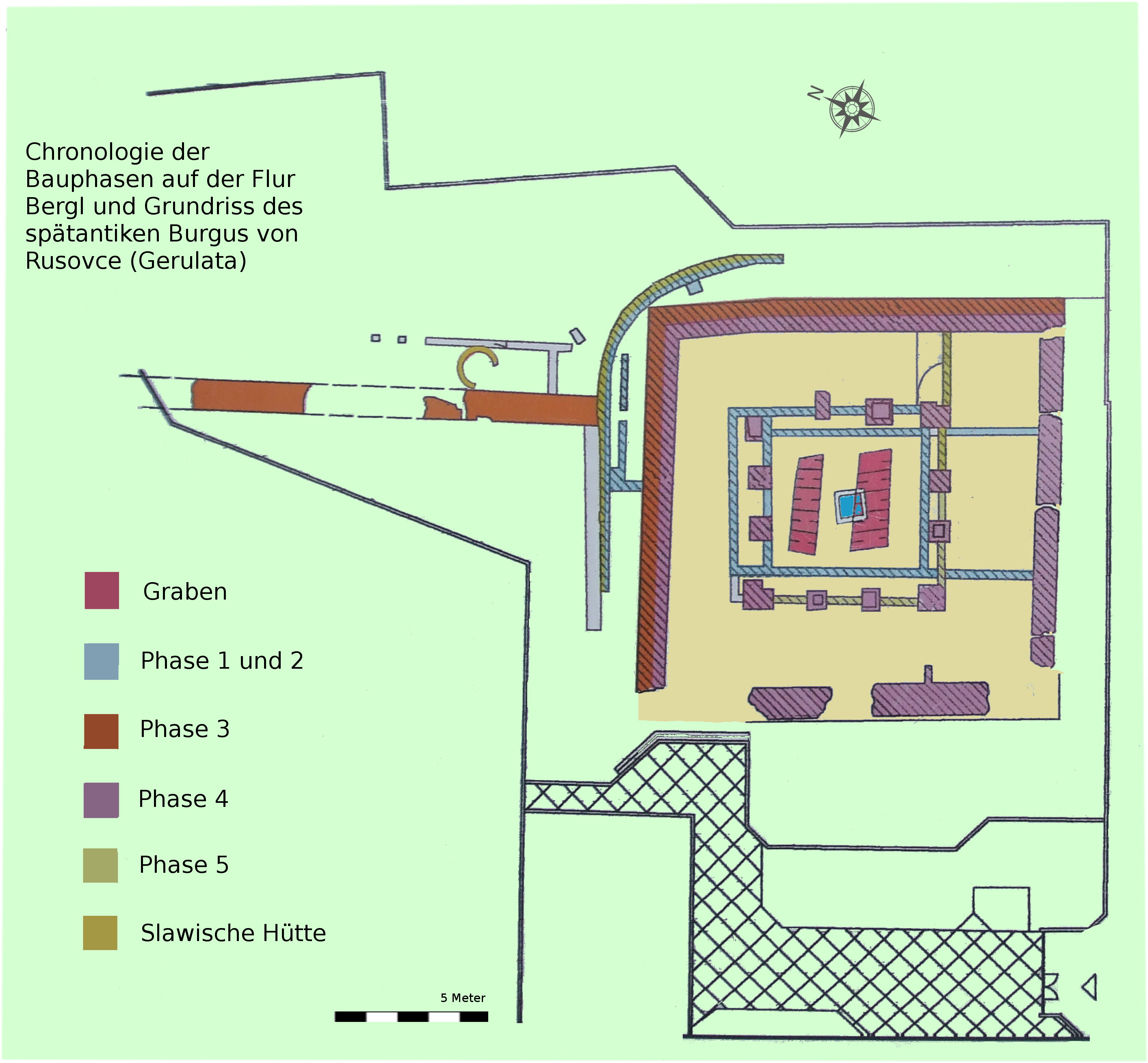 Bauphasenplan spätrömischer Burgus a.d.Flur Bergl/Rusovce (Kastell Gerulata)